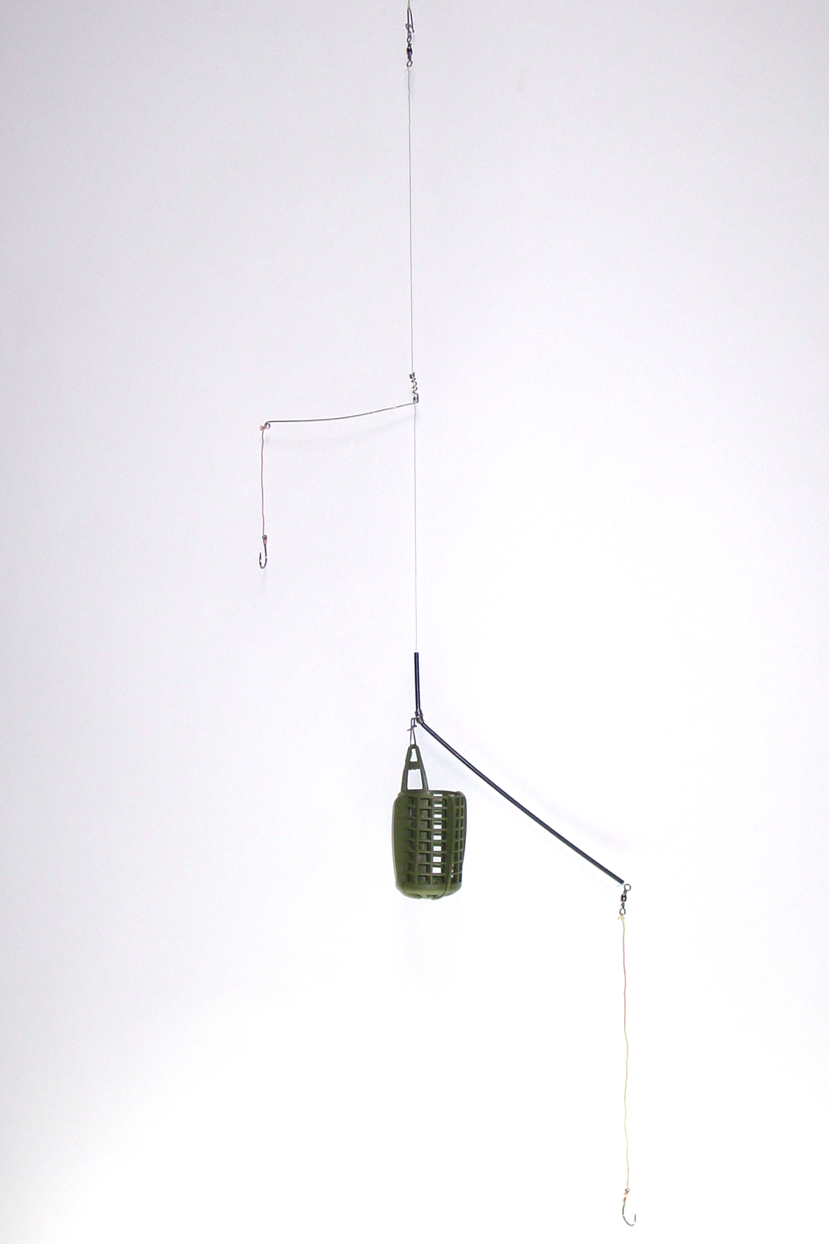 fider